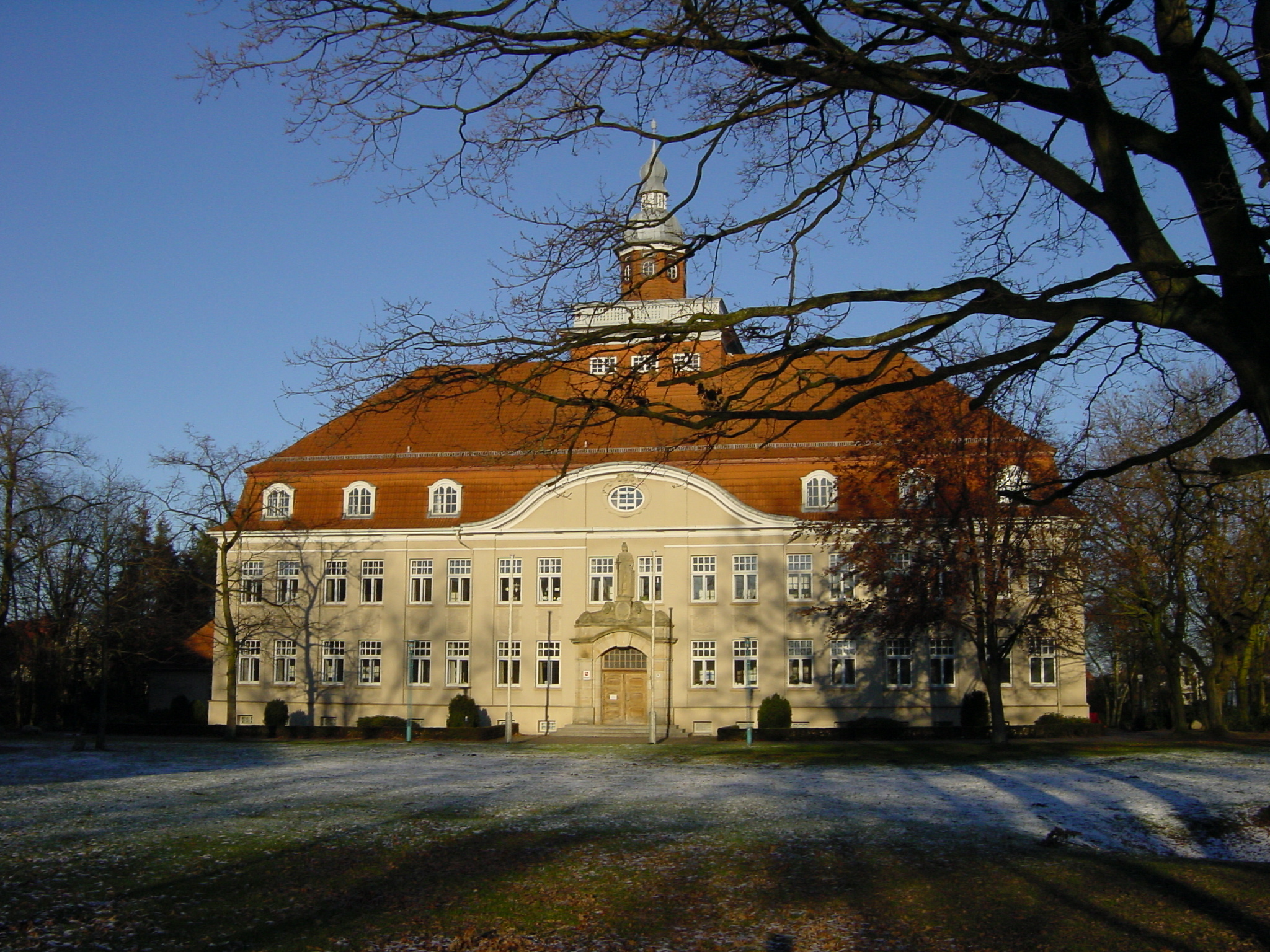 2002-12-24 01-01 Cloppenburg 080